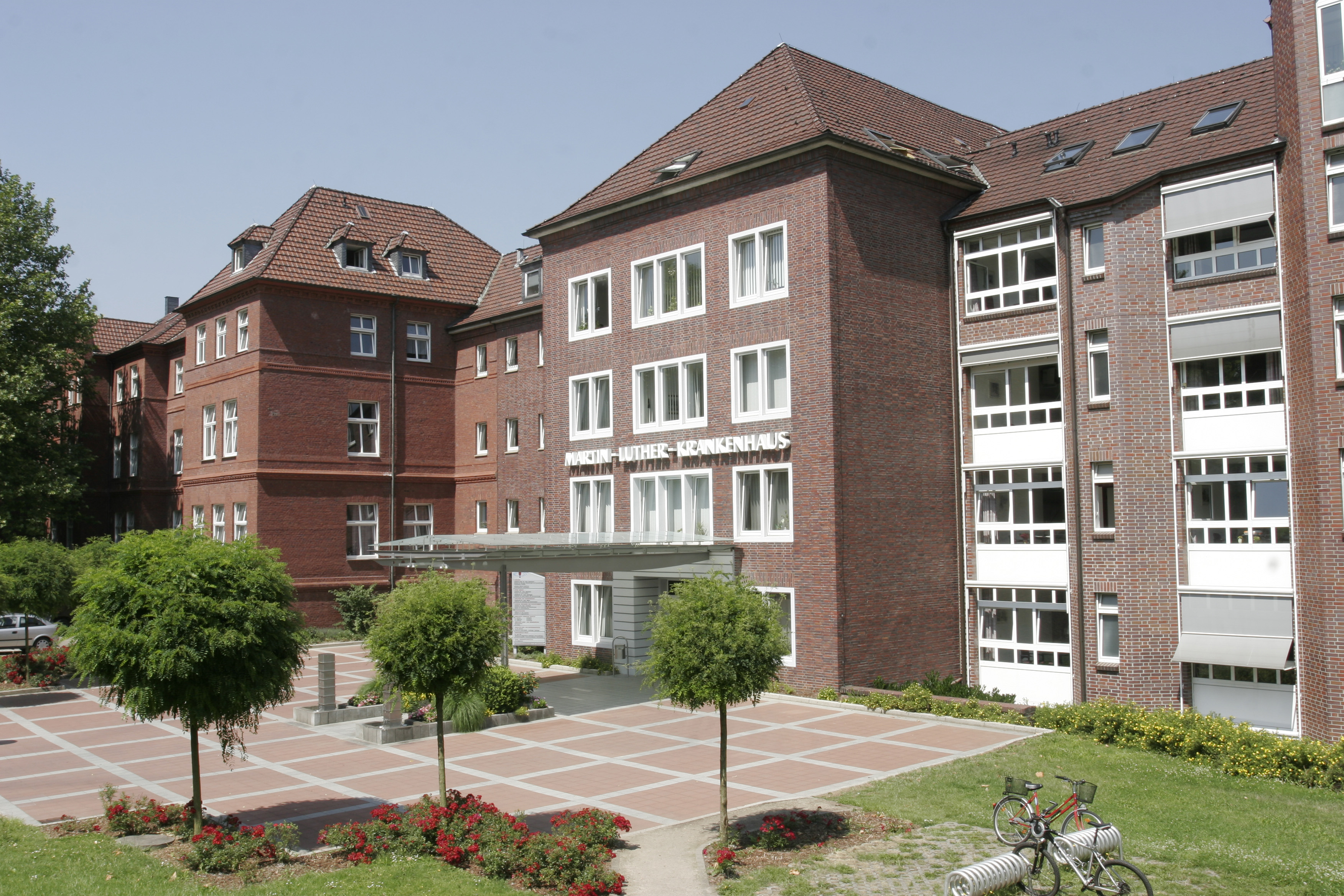 Haupteingang mit altem Gebäudeflügel von 1890.